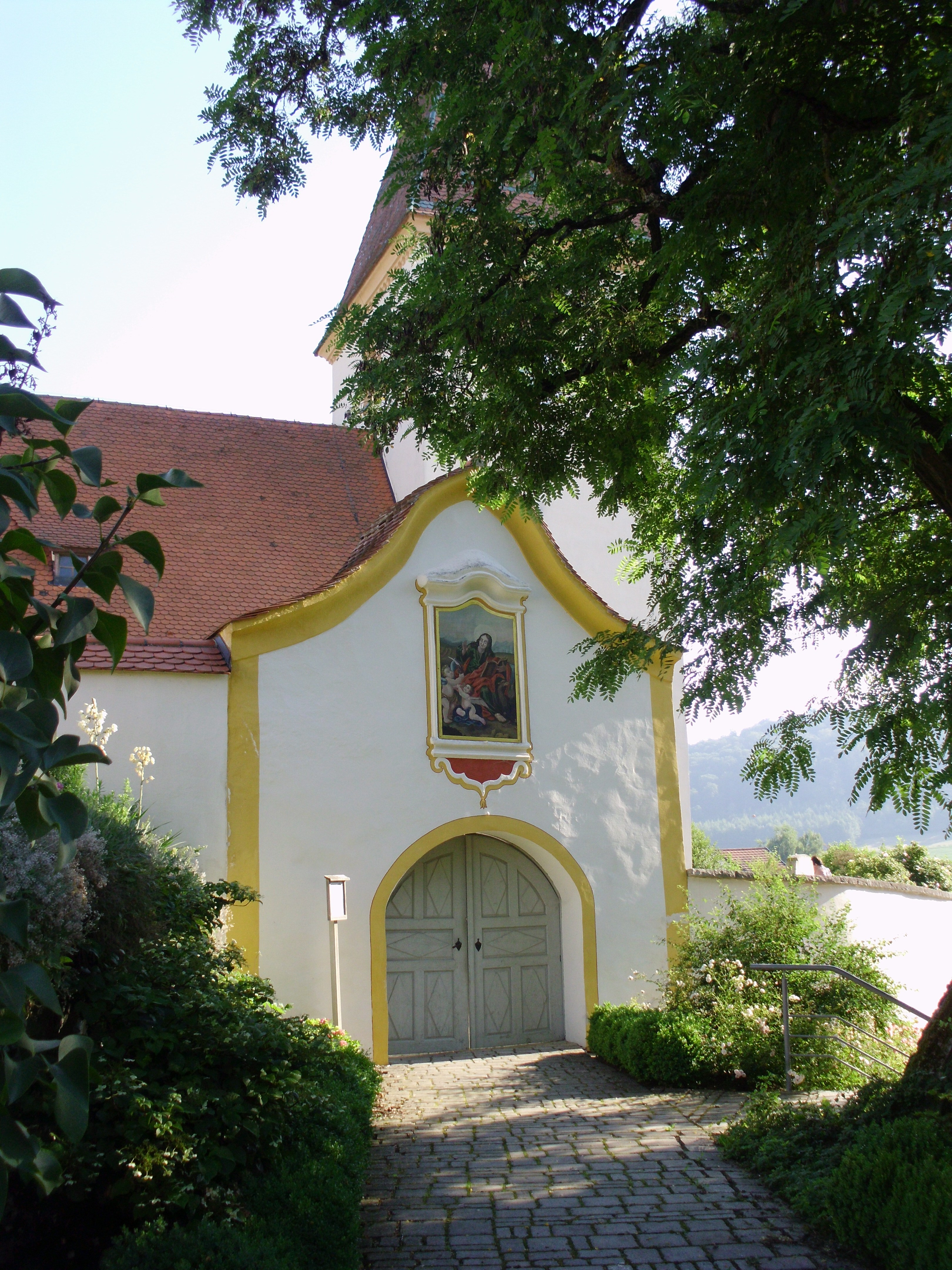 Großhöbing, Ortsteil der Stadt Greding im mittelfränkischen Landkreis Roth in Bayern, barocker Friedhofseingang